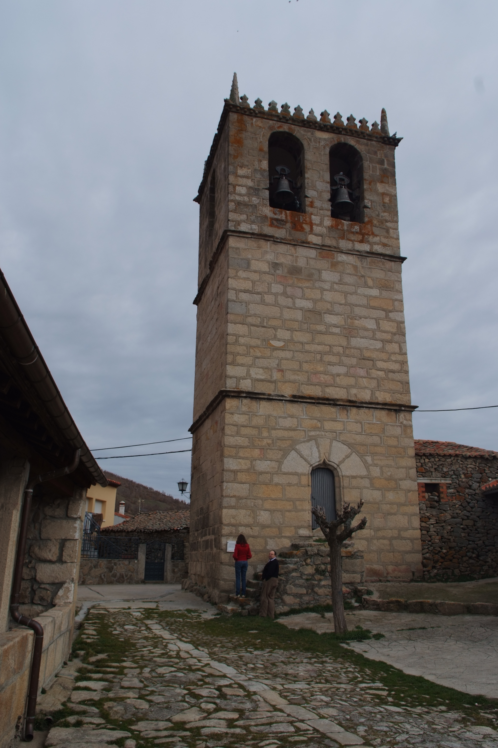 Iglesia de Navalperal de Tormes (Ávila; España)